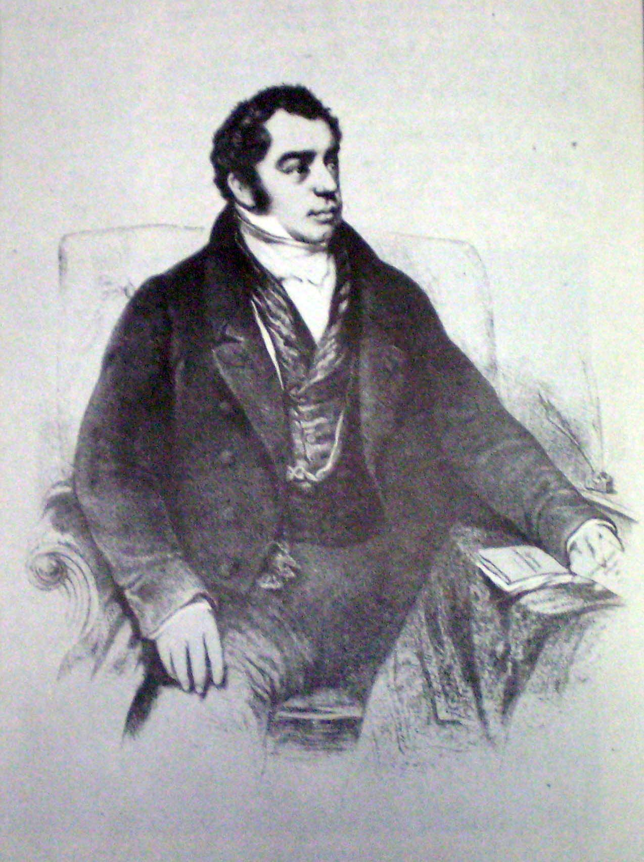 Bernardino Rivadavia. Litografía de Pelvilain